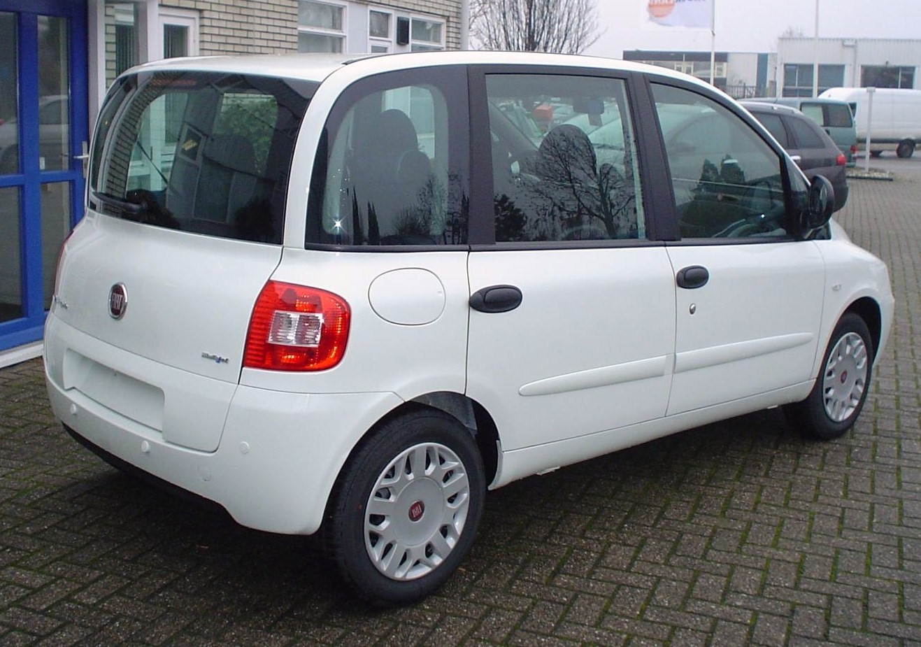 Foto Fiat Multipla Back